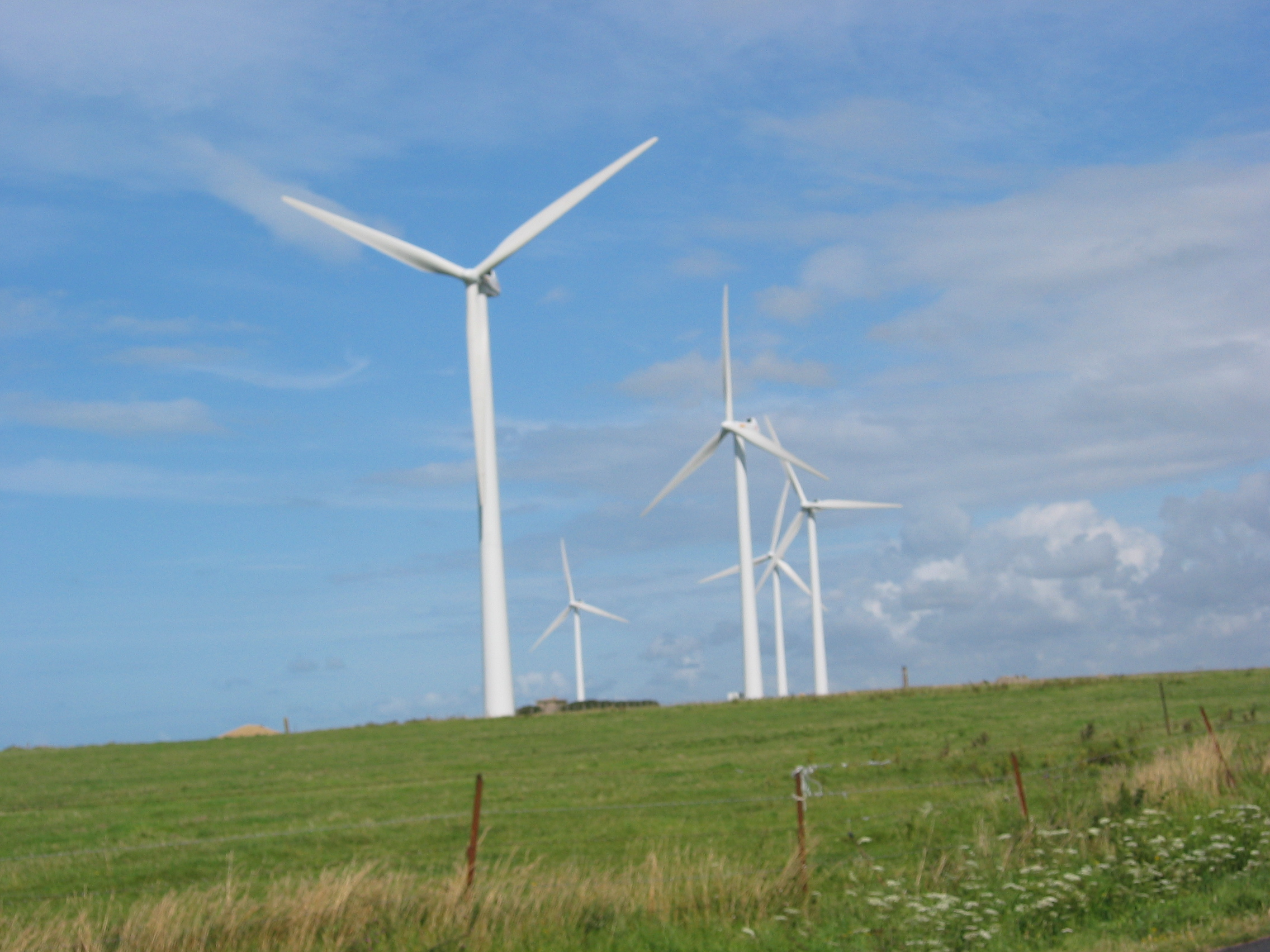 Éoliennes, falaise de Fécamp, Normandie, France, 2007